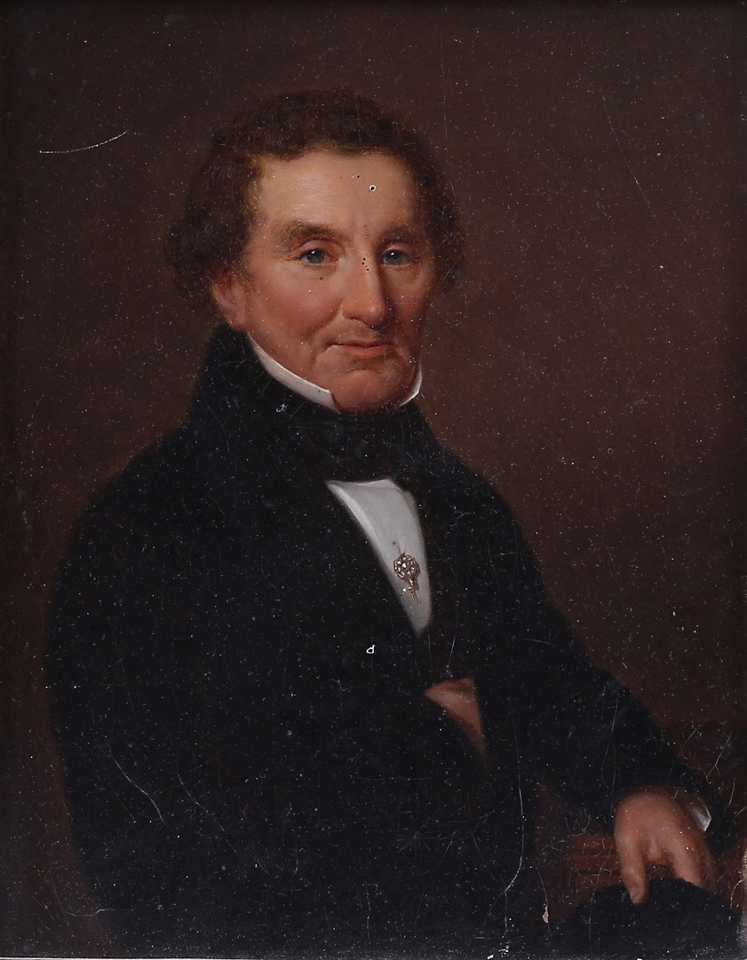 Porträtt av Isak Gustaf Sehman (1773-1855) avporträtterad ca 1830 av okänd.